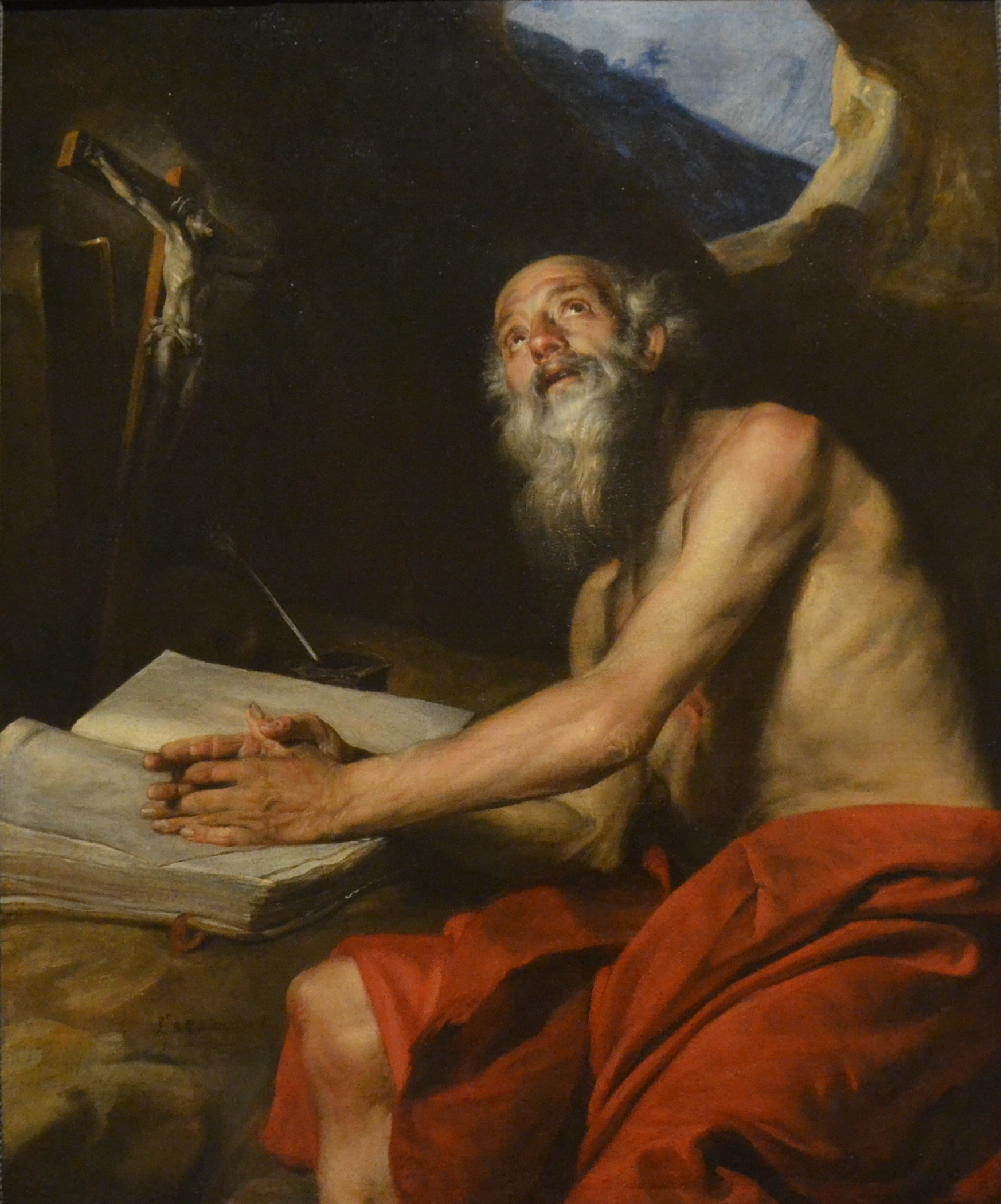 San Jerónimo, óleo sobre lienzo, Dallas, Meadows Museum